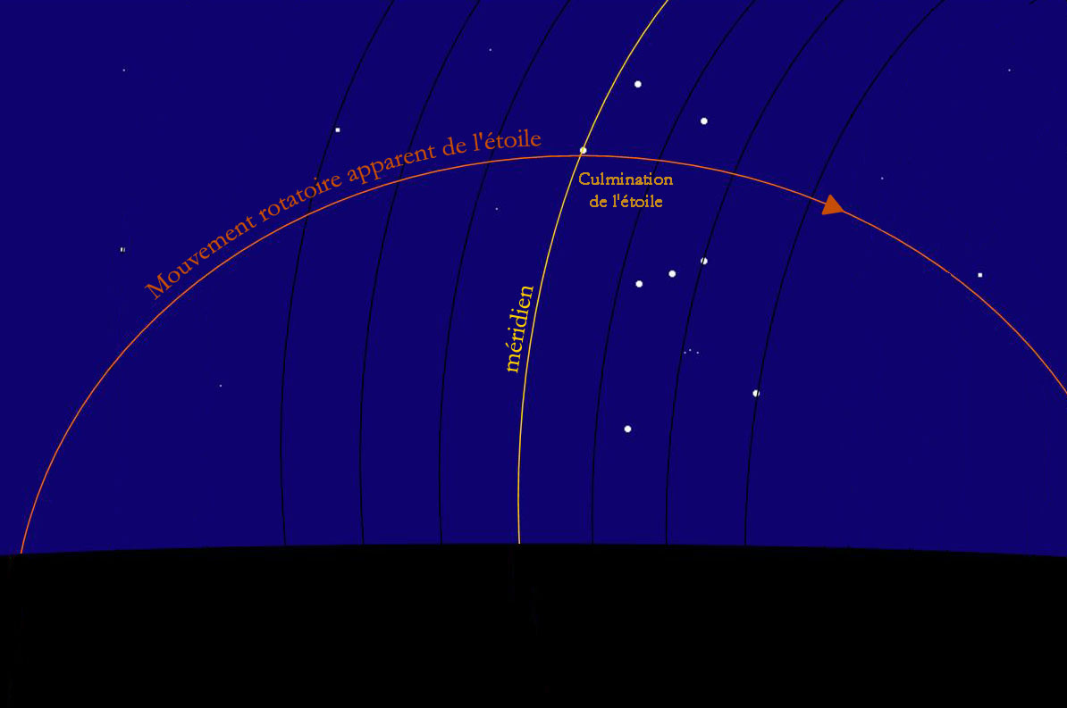 Explication de l'utilisation d'une horloge ramesside.